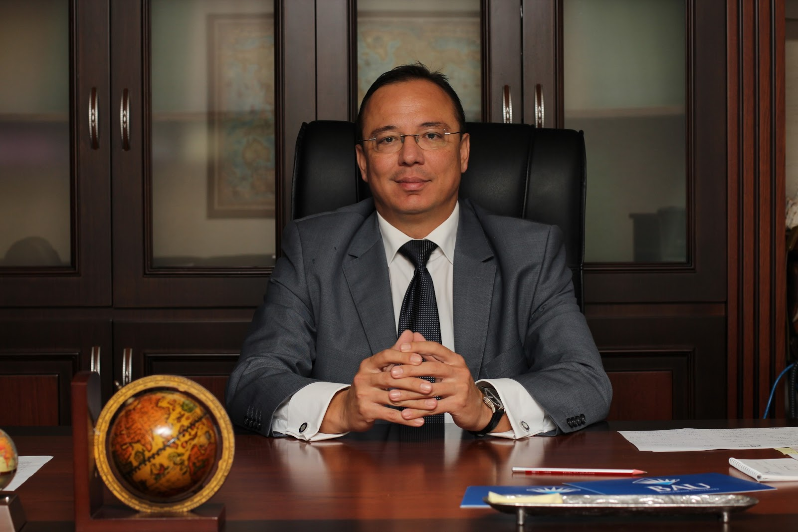 Prof. Dr. Türker Kılıç